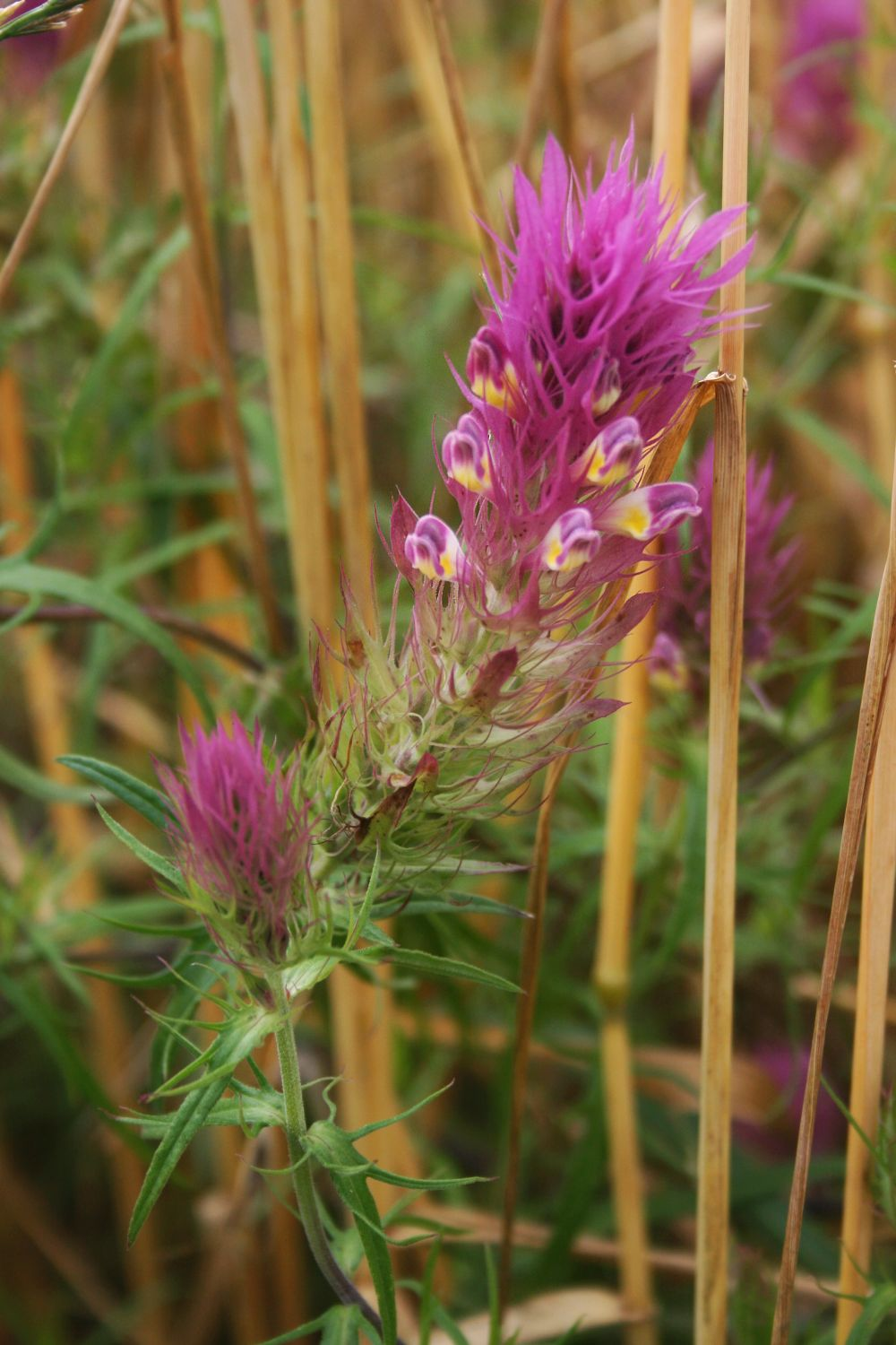 Acker-Wachtelweizen (Melampyrum arvense), Sommerwurzgewächse (Orobanchaceae) - Österreich/Austria/Autriche: Niederösterreich, Eichkogel S Mödling